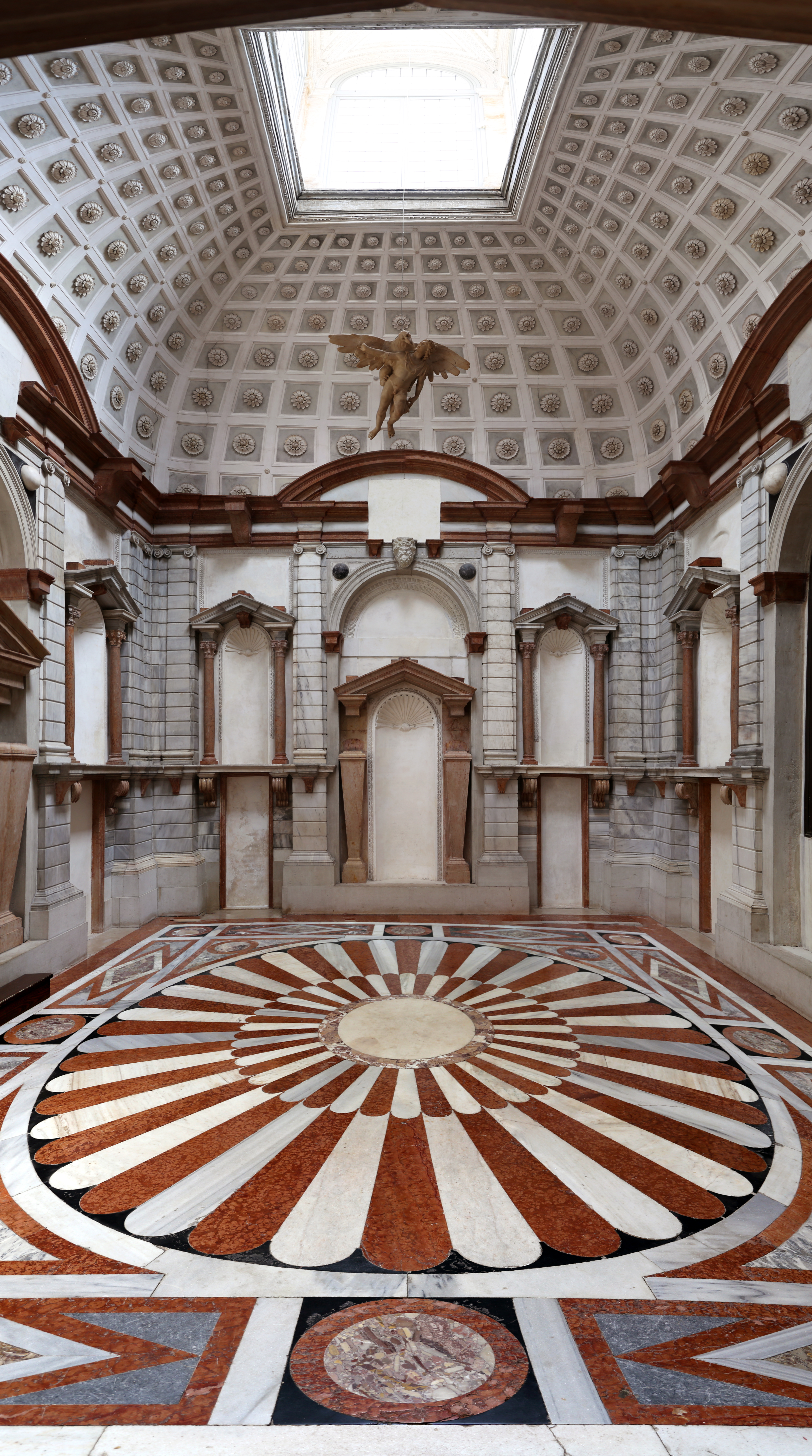 Palazzo Grimani (Castello) This is a photo of a monument which is part of cultural heritage of Italy.